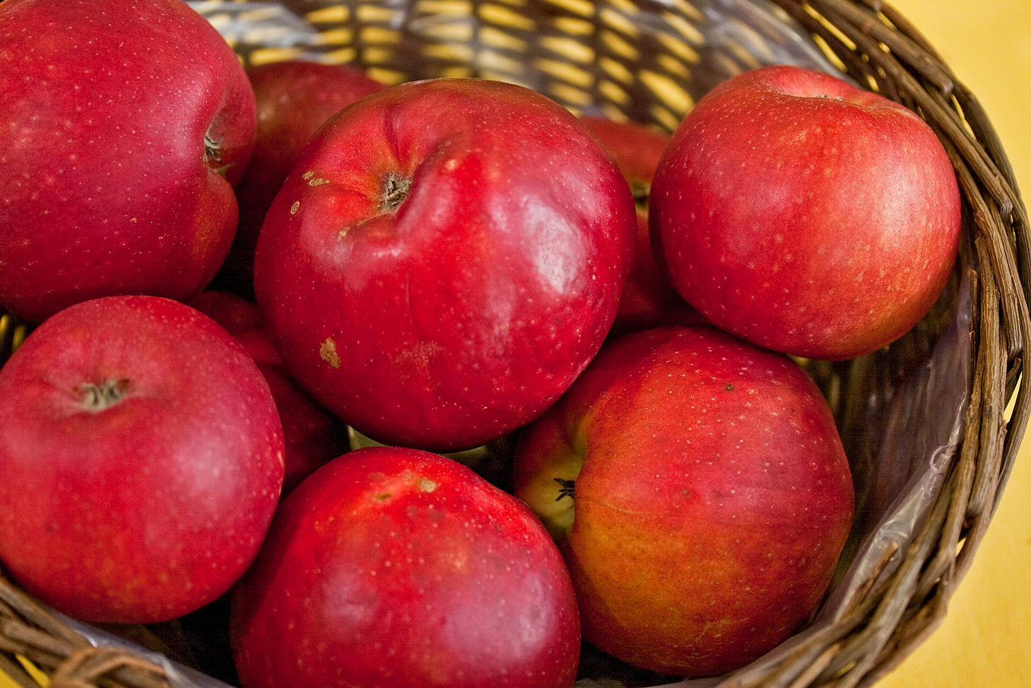 Der Danziger Kantapfel ist eine Apfelsorte